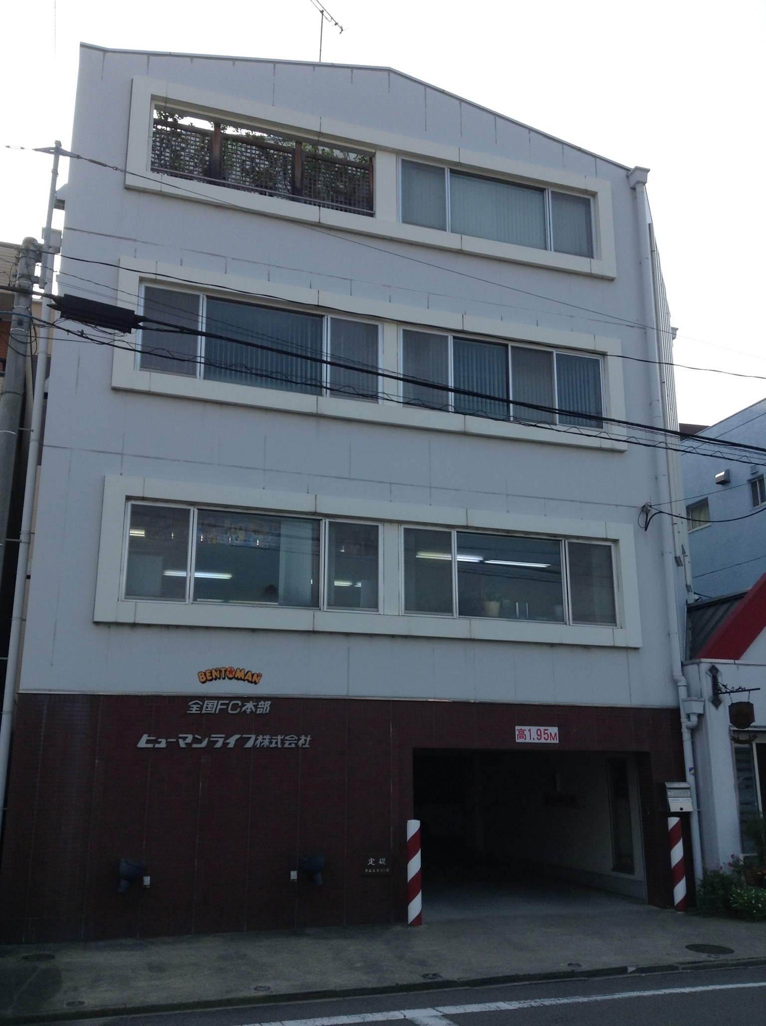 名古屋市西区香呑町に所在するヒューマンライフ本社。